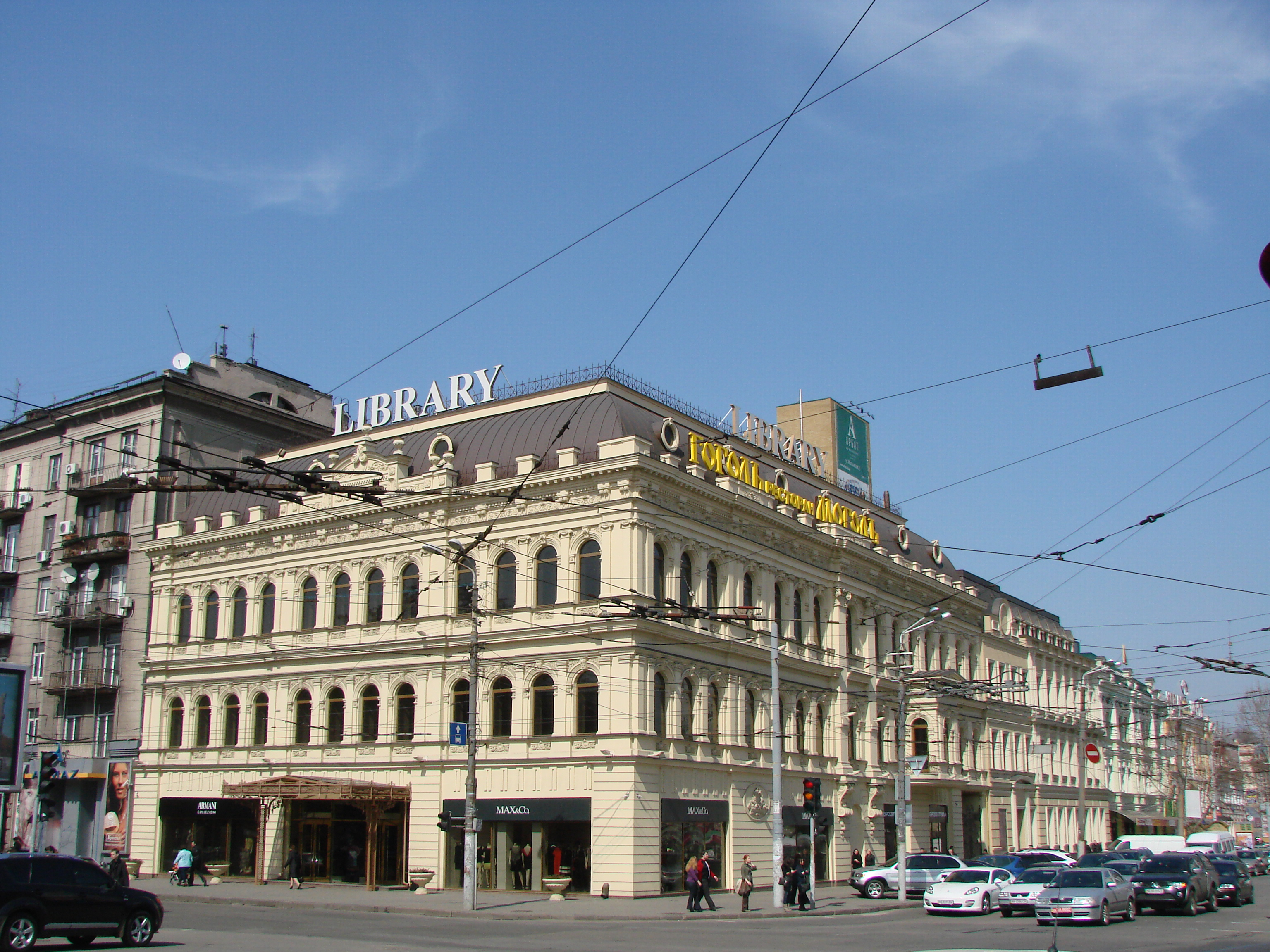 Будинок, де розміщувалася міська громадська бібліотека (1902-1925 рр.). Мем. дошка, Дніпропетровськ, Московська вул., 3